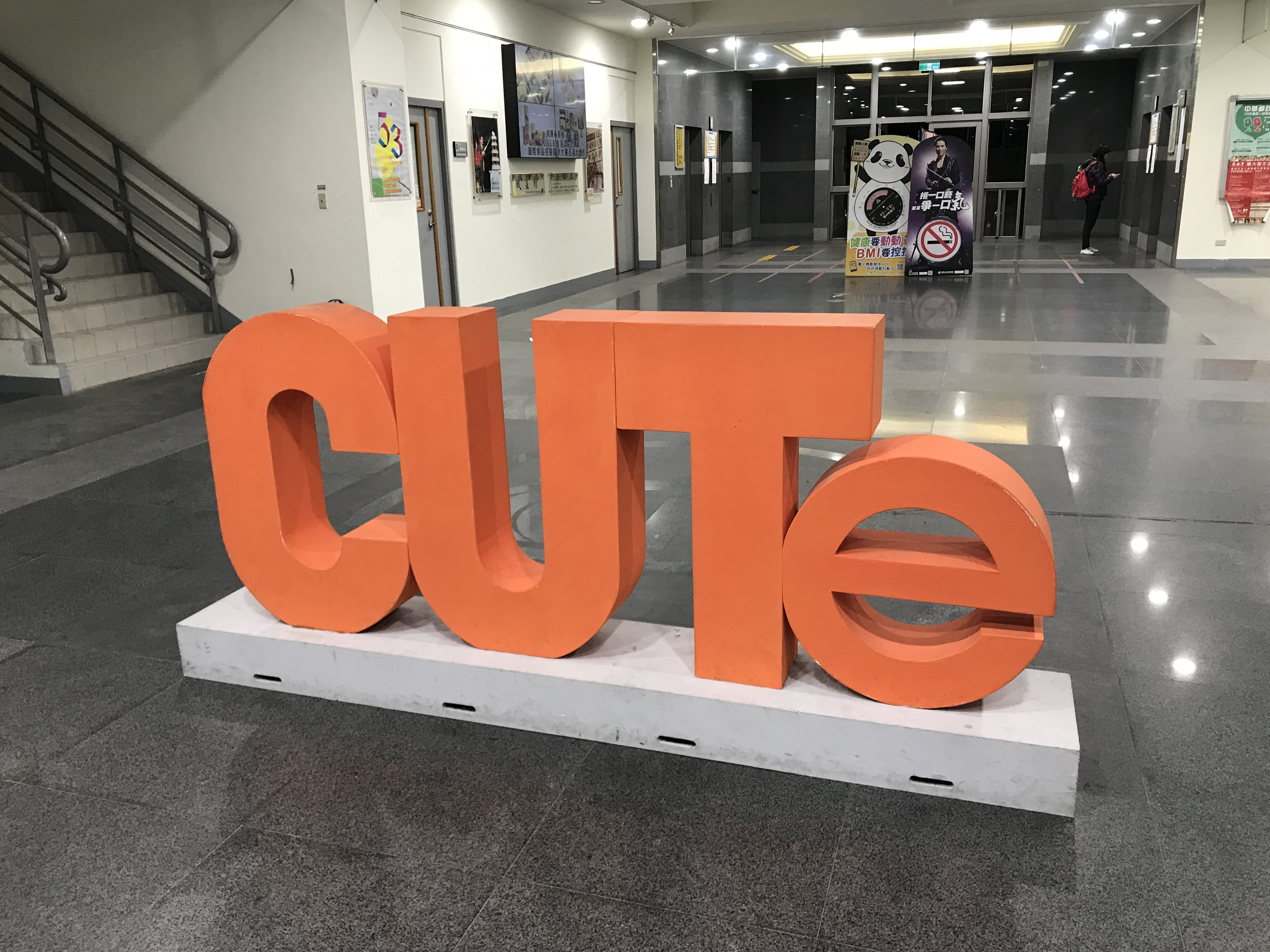 中國科技大學文山校區大樓內設有學校英文名稱縮寫CUTe的橘色雕塑